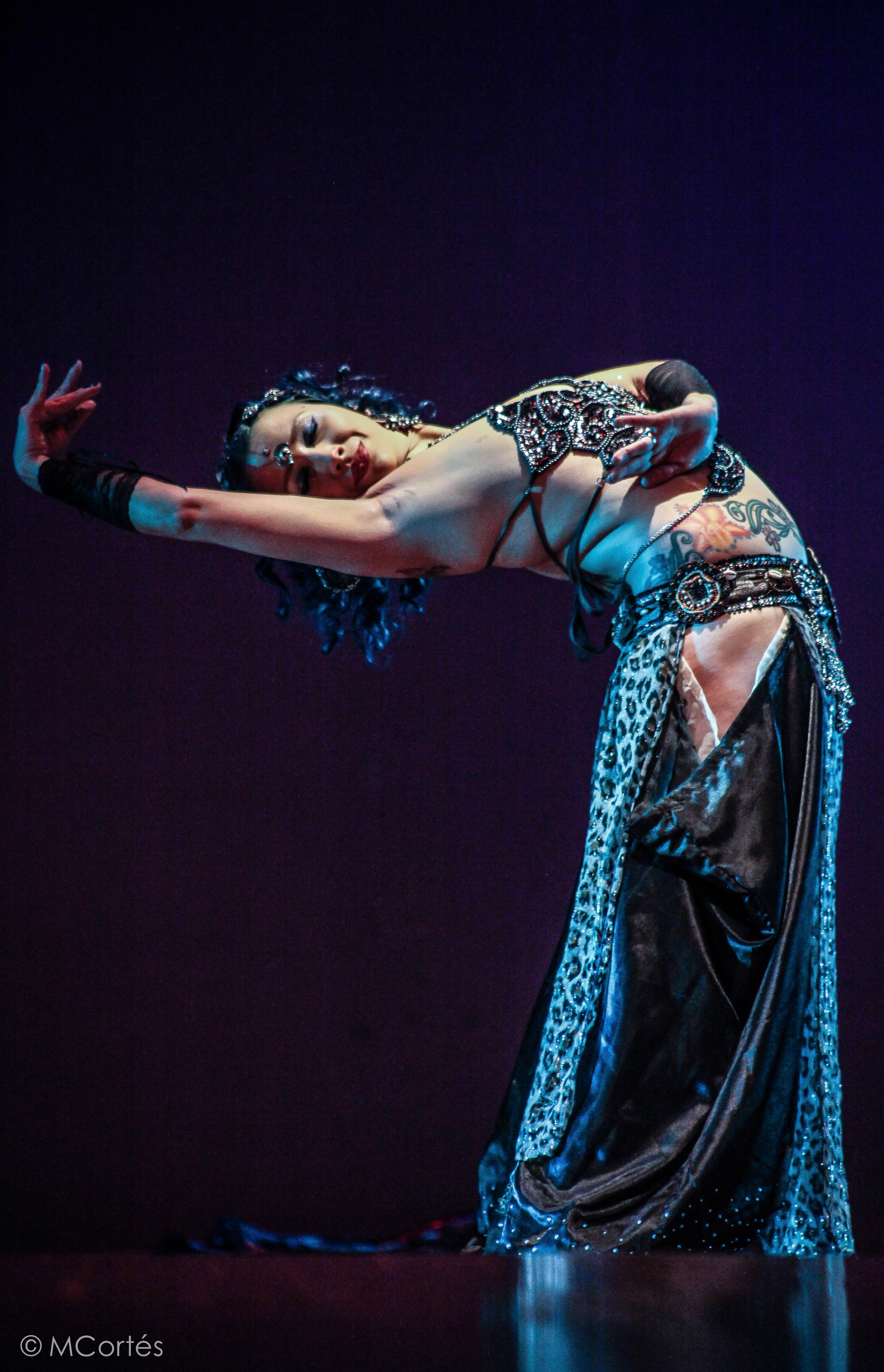 Fotografía: Maria Conchita C. G.